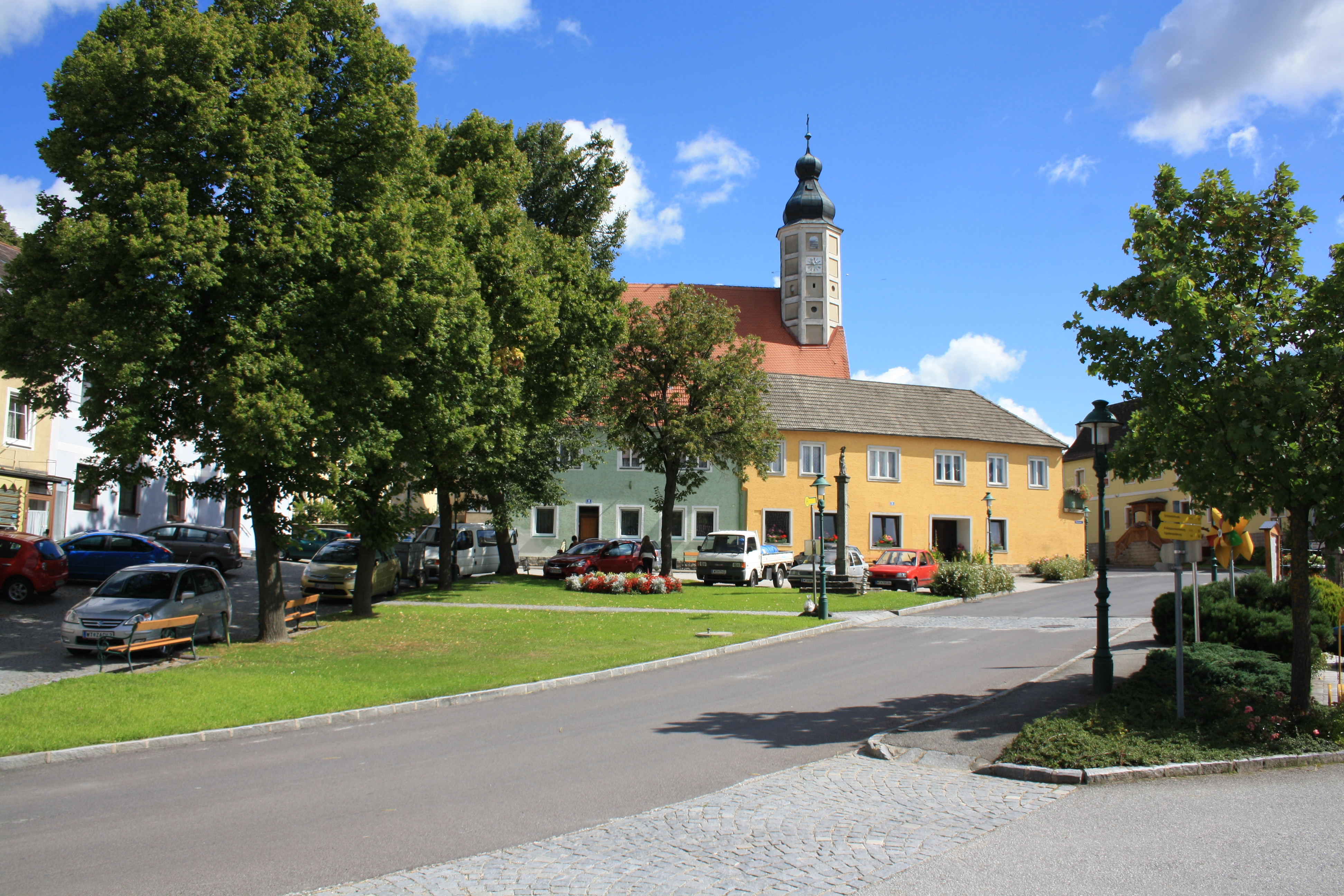 Marktplatz in Windigsteig, Bezirk Waidhofen/Thaya,Austria